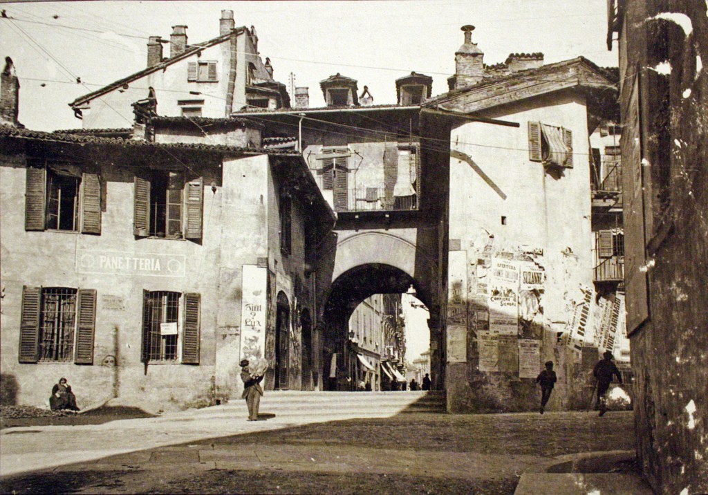 Milano, la Pusterla dei Fabbri lato naviglio